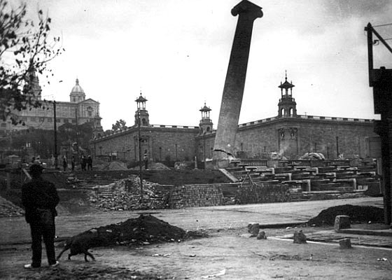 Enderrocament de les Les Quatre Columnes per Primo de Rivera. (Barcelona) Les Quatre columnes eren 4 columnes, amb capitells corintis o jònics?, obra de l'arquitecte Puig i Cadafalch, aixecades l'any 1919 a on actualment hi ha la font de Montjuïc, a Barcelona (Espanya). Simbolitzaven les 4 barres de la Senyera catalana, que estaven destinades a convertir-se en un dels símbols del catalanisme. Motiu pel qual van ser enderrocades l'any 1928, durant la dictadura de Primo de Rivera, que va eliminar sistemàticament tots els símbols públics de catalanisme, per tal que no tinguessin el resó que li podia donar l'Exposició Universal de 1929 que havia de tenir lloc a Montjuïc. Pel mateix motiu la dictadura va anomenar finalment Poble Espanyol, a la mateixa muntanya, al que s'havia de dir Iberona, en homenatge als Íbers, primers pobladors de les terres catalanes, i va anomenar així la Plaça d'Espanya, col·locant dues torres venecianes.